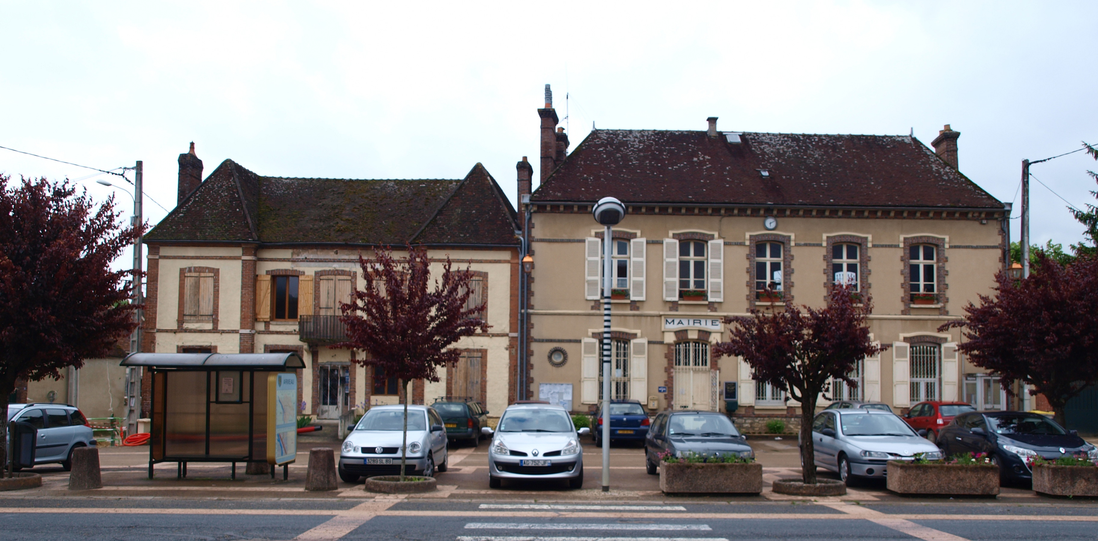 Armeau (Yonne, France)